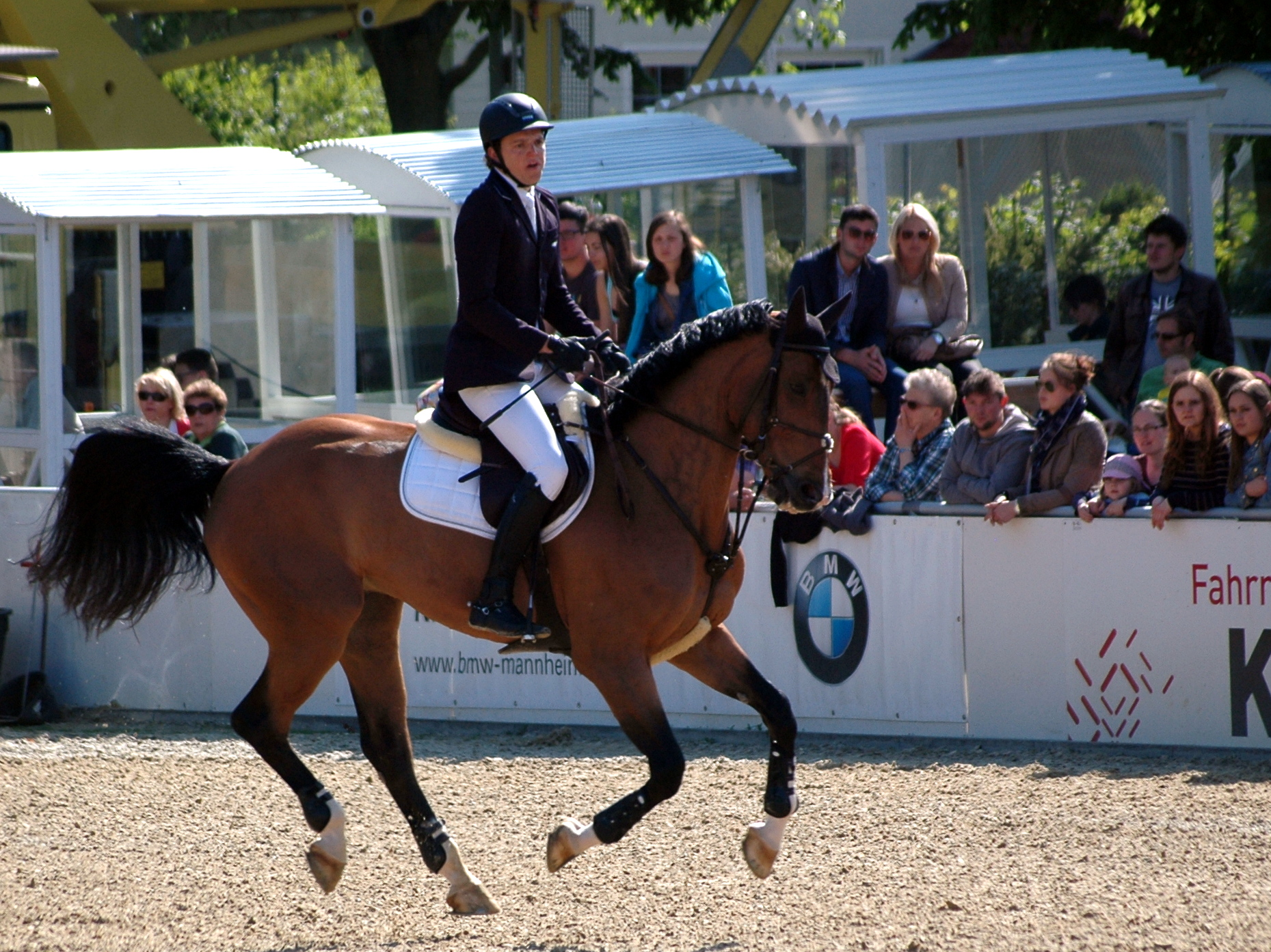 51. Maimarkt-Turnier: Andreas Kreuzer mit Balance